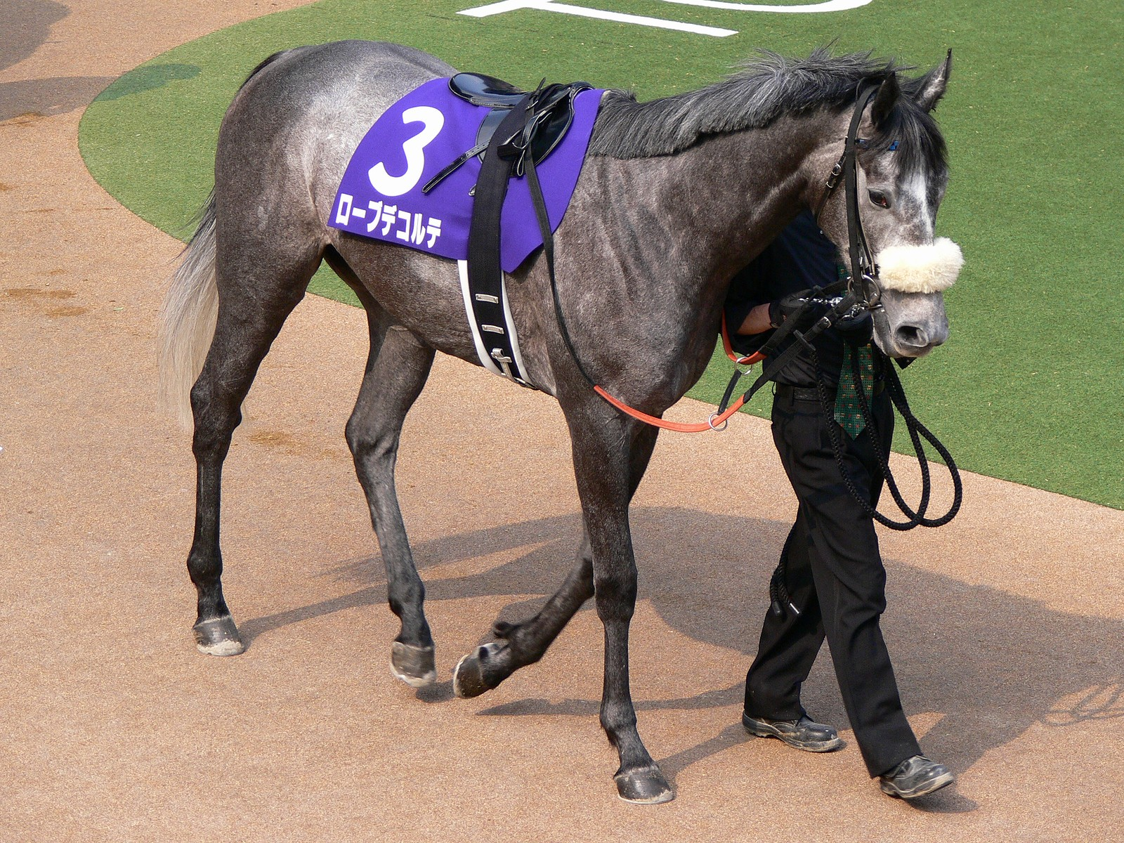 Robe Decollte ローブデコルテ at "Victoria Mile"(JpnI).